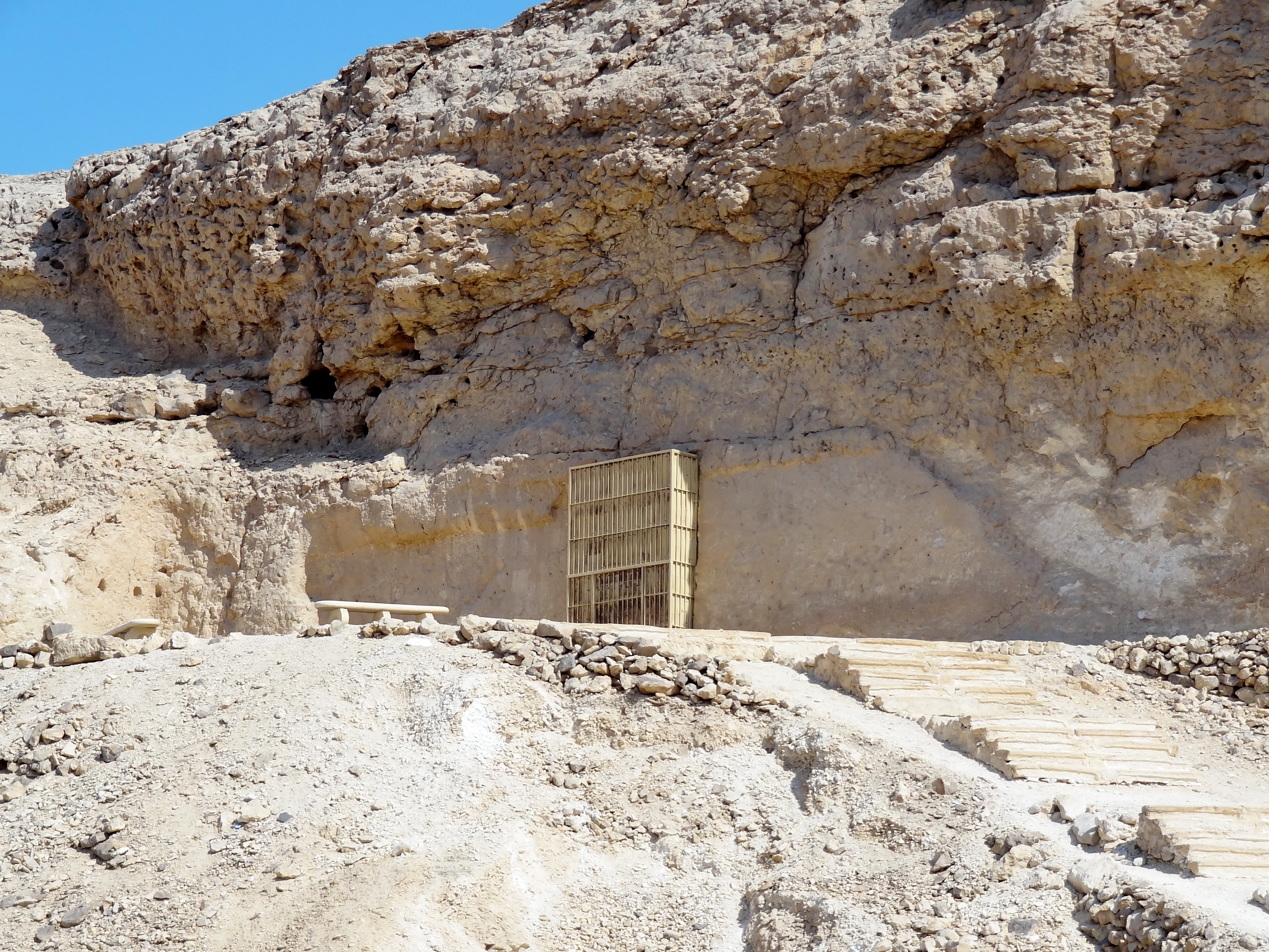 Grab des Ahmose (TA 3) in Tell el-Amarna, Ägypten